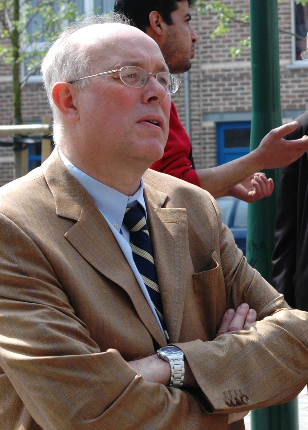 Inauguration du Centre d'entreprise de Molenbeek, en présence du Ministre Président Charles Piqué auteur de la photo L Glucksmann, qui octroye les droits d'utilisation pour la Fondation.